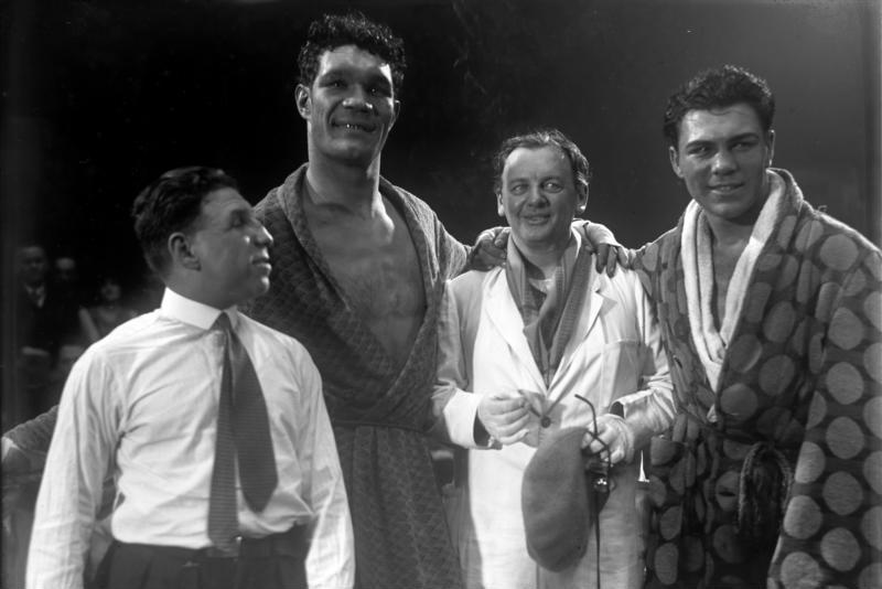 Der deutsche Boxmeister Max Schmeling als Filmstar! Der deutsche Boxmeister Max Schmeling kämpfte mit dem portugisischen Schwergewichtsmeister Jose Santa im Filmring in Berlin-Mariendorf! Der deutsche Box-Schwergewichtsmeister Max Schmeling (rechts) sowie der portugisische Schwergewichtsmeister Jose Santa (links) vor ihrem Boxmatch. In der Mitte der bekannte Berliner Regisseur Reinhold Schünzel, welcher die Filmaufnahmen leitete.